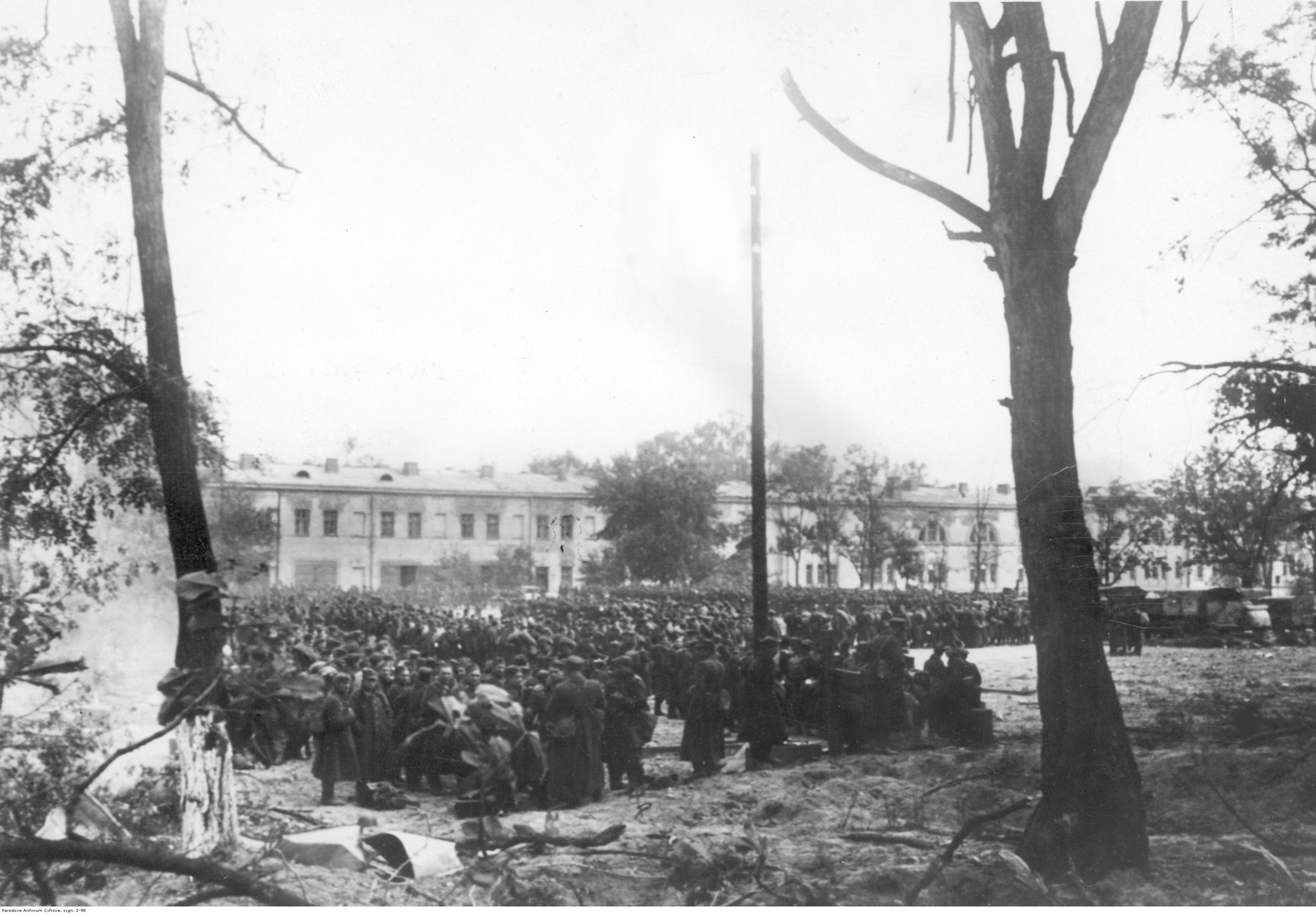 Polskie oddziały przygotowywują się do składania broni po kapitulacji Twierdzy Modlin.